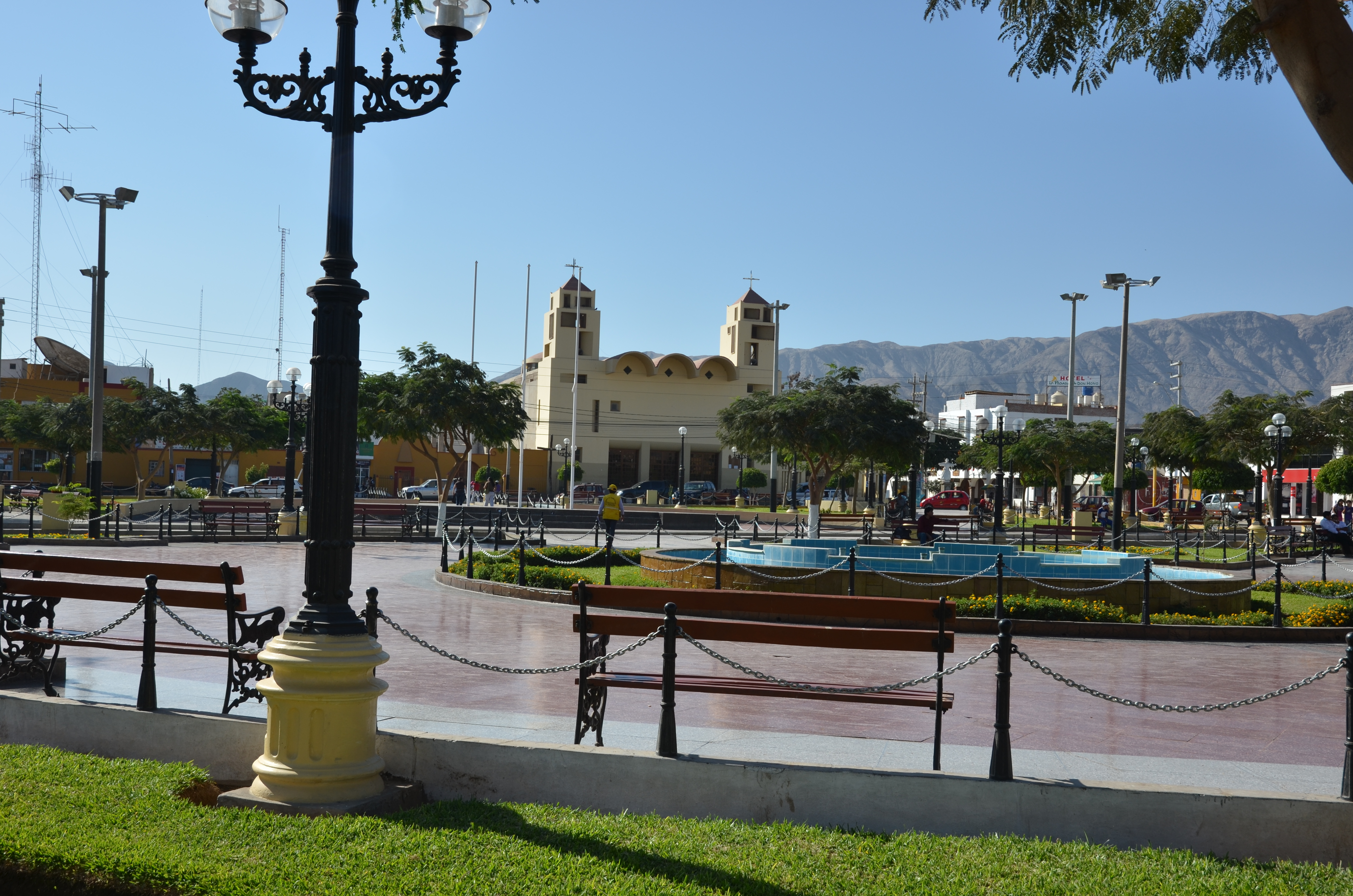 Nasca - Plaza de Armas